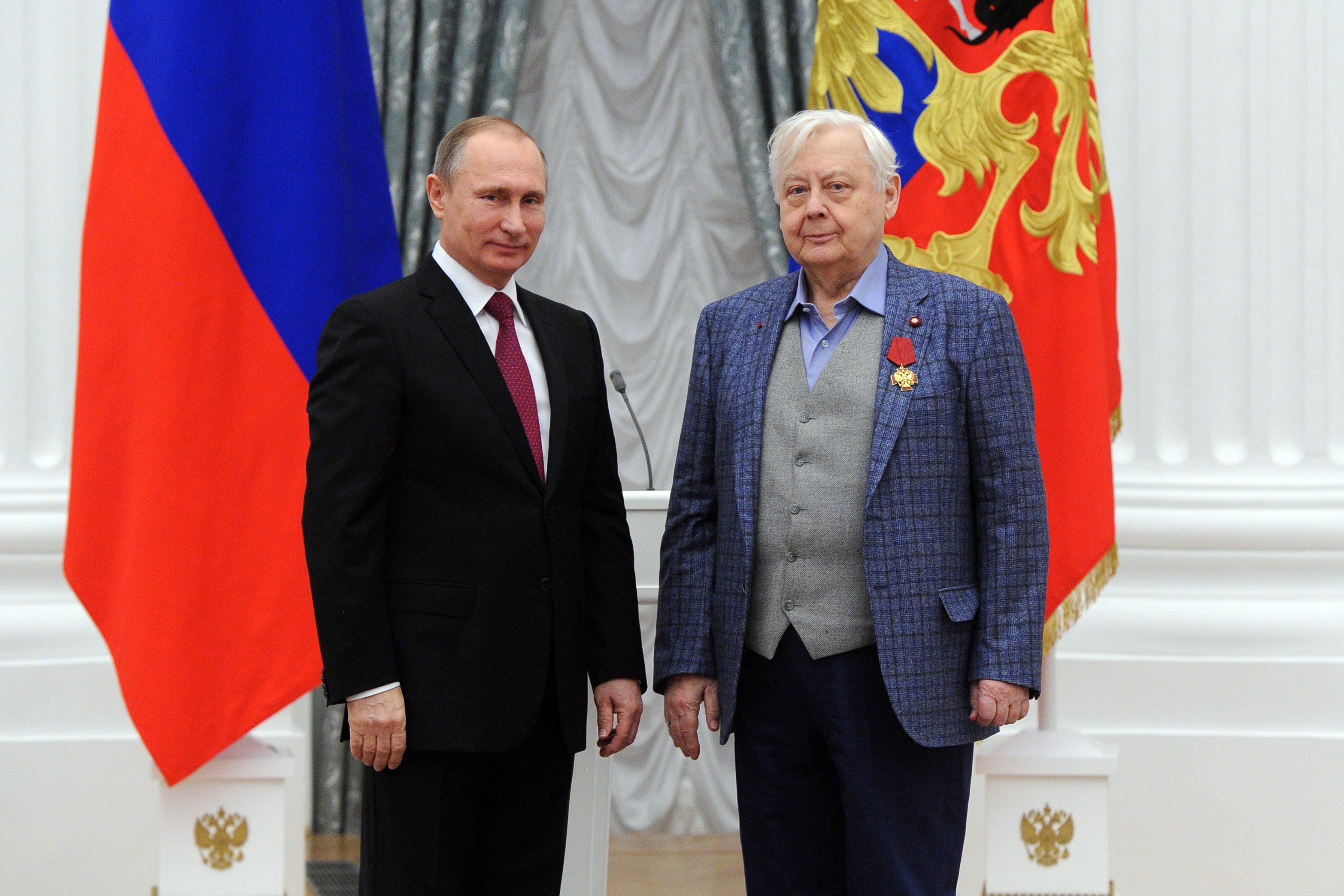 На церемонии вручения государственных наград Российской Федерации. Орденом «За заслуги перед Отечеством» IV степени награждён художественный руководитель – директор Московского художественного театра имени А.П.Чехова Олег Табаков.